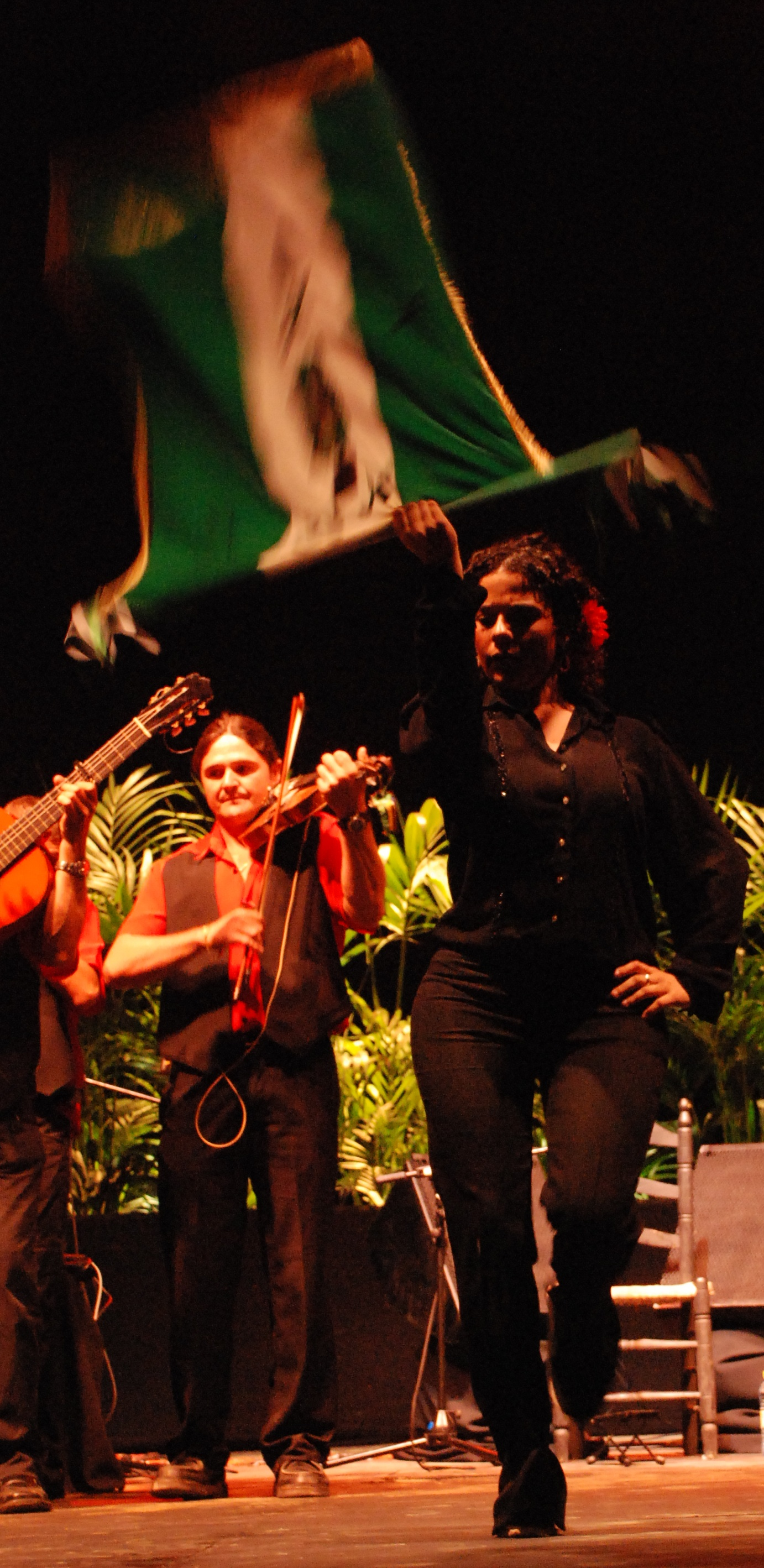 Baile de verdiales con la bandera de Andalucía, durante la edición de 2007 del festival "Málaga en Flamenco", Málaga, Andalucía